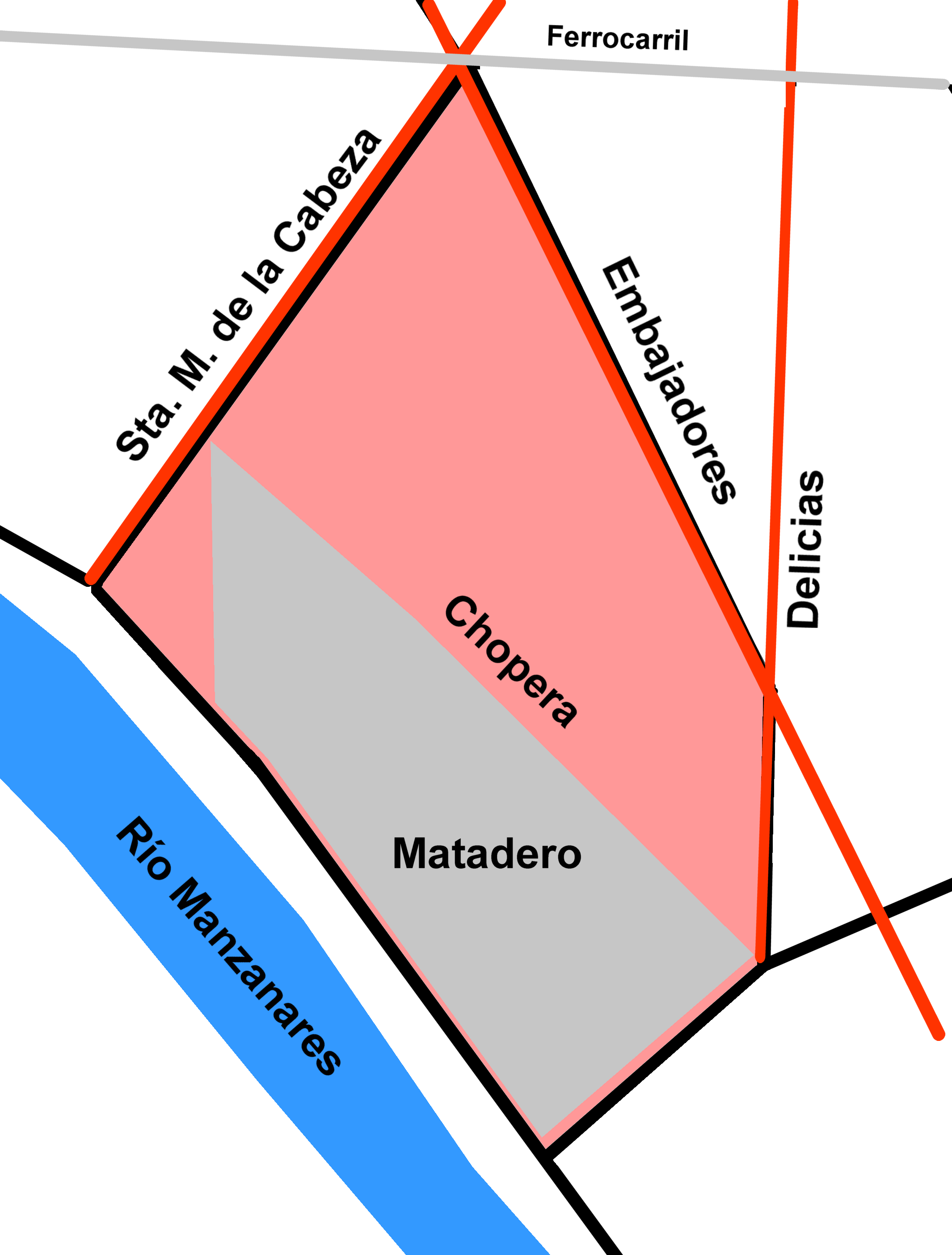 Esquema del barrio de la Chopera. Arganzuela. Madrid. España